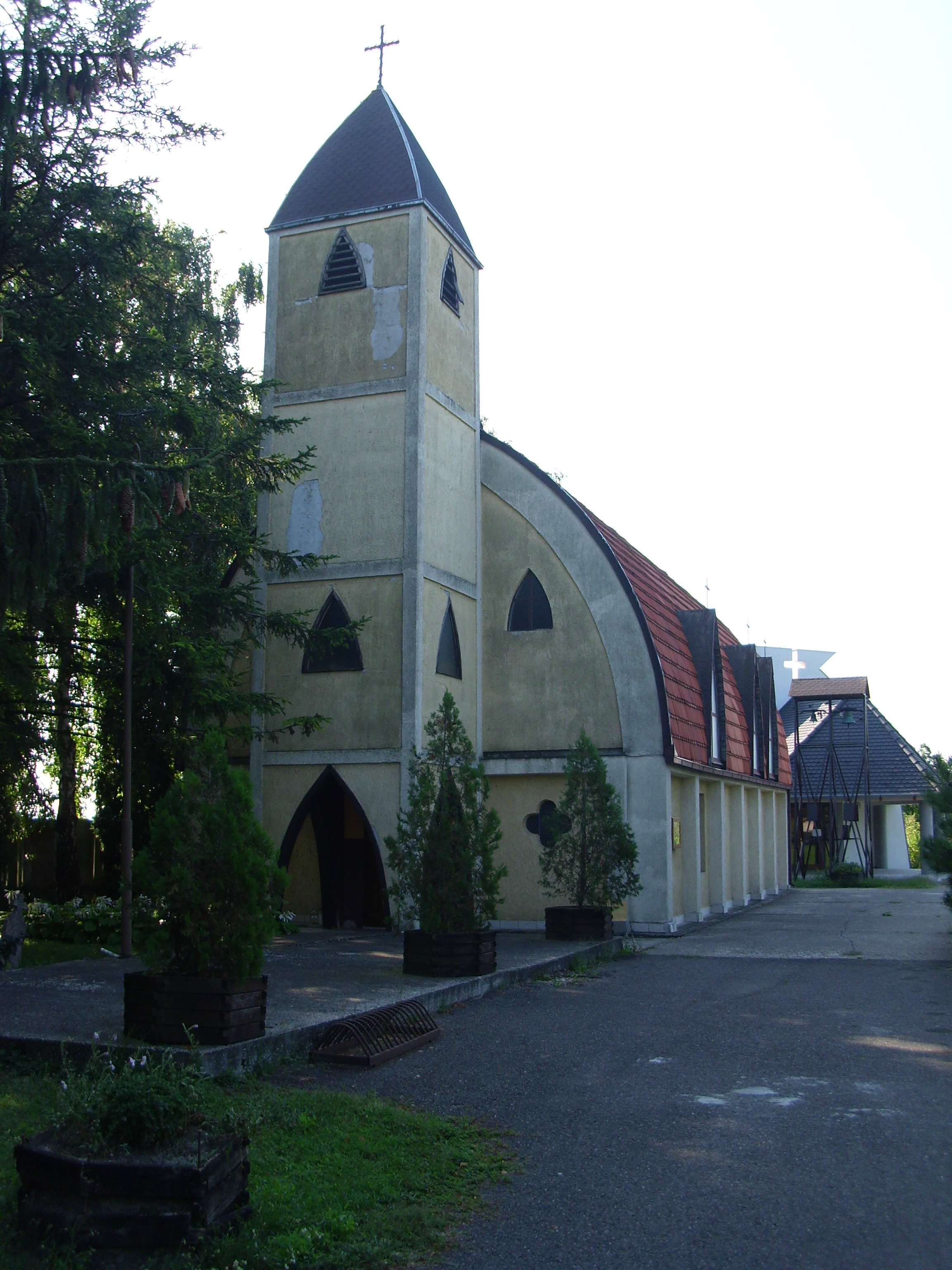 Nagybodaki katolikus templom